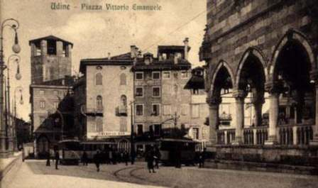 Udine, piazza Vittorio Emanuele con tram.